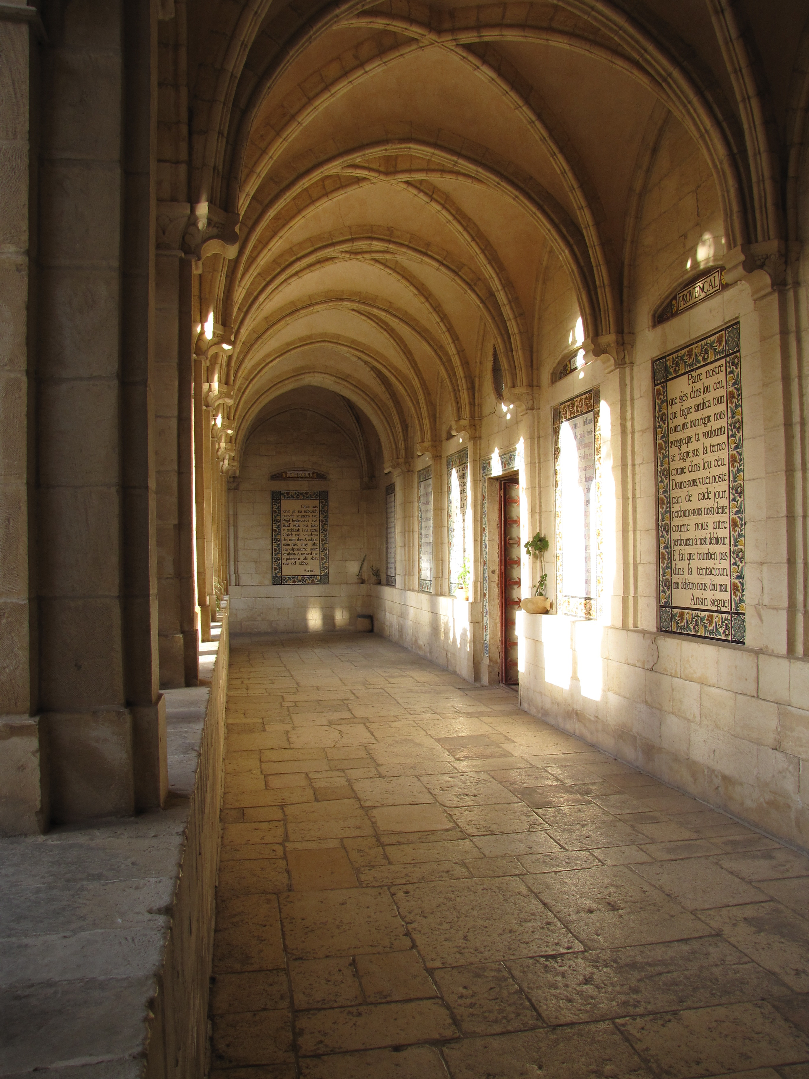 Trip to Jerusalem Jerusalem